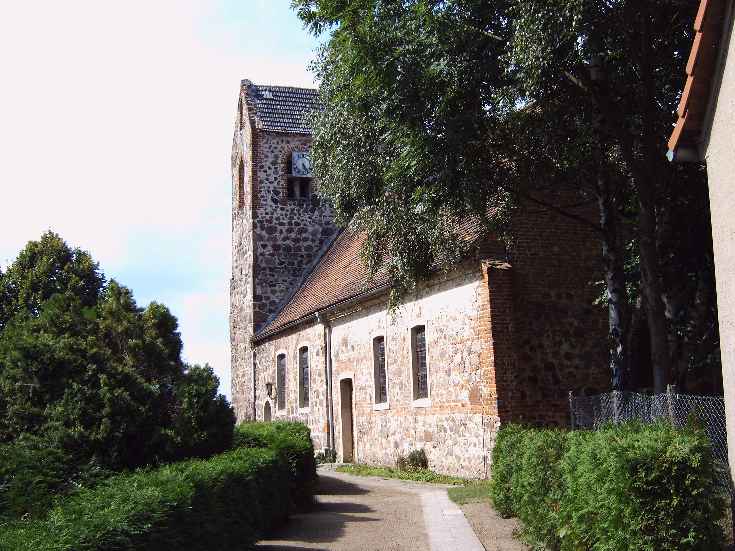 Dorfkirche in Miltern, Ortsteil von Tangermünde